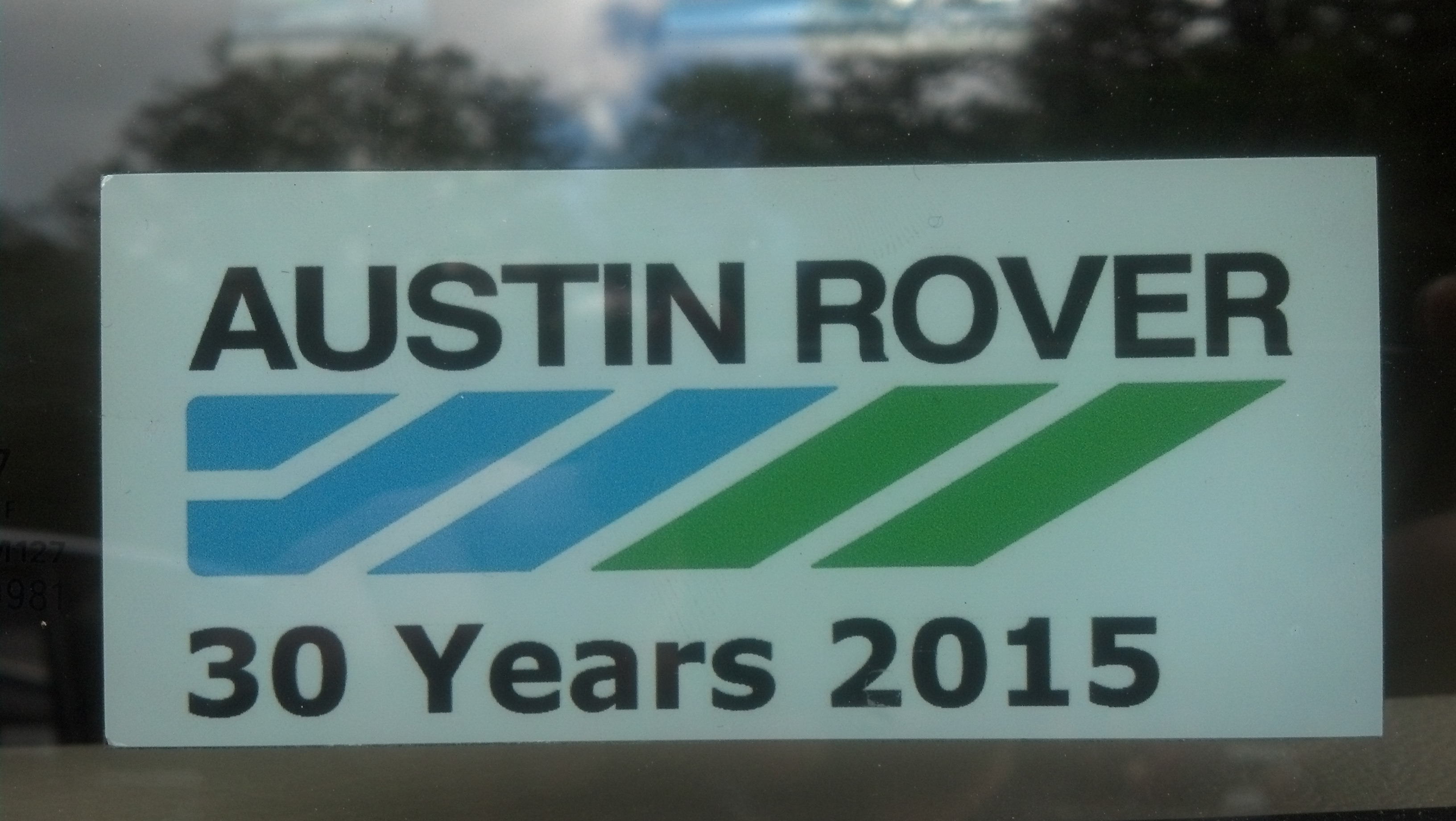 Logo Austin Rover na výroční samolepce - fotografie pořízena na mezinárodním srazu MG Rover klubu v Brně, květen 2017.